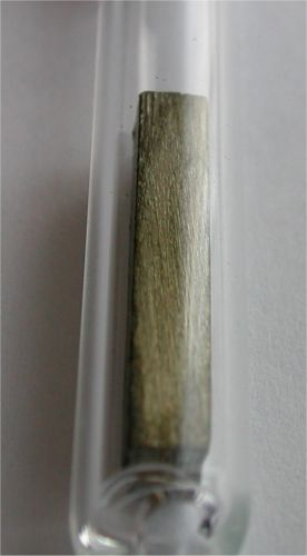 Bildbeschreibung: Europium unter Argongas zum Schutz vor Oxidation Quelle: Foto aus meiner Elementesammlung Fotograf/Zeichner: Tomihahndorf Datum: April 2006